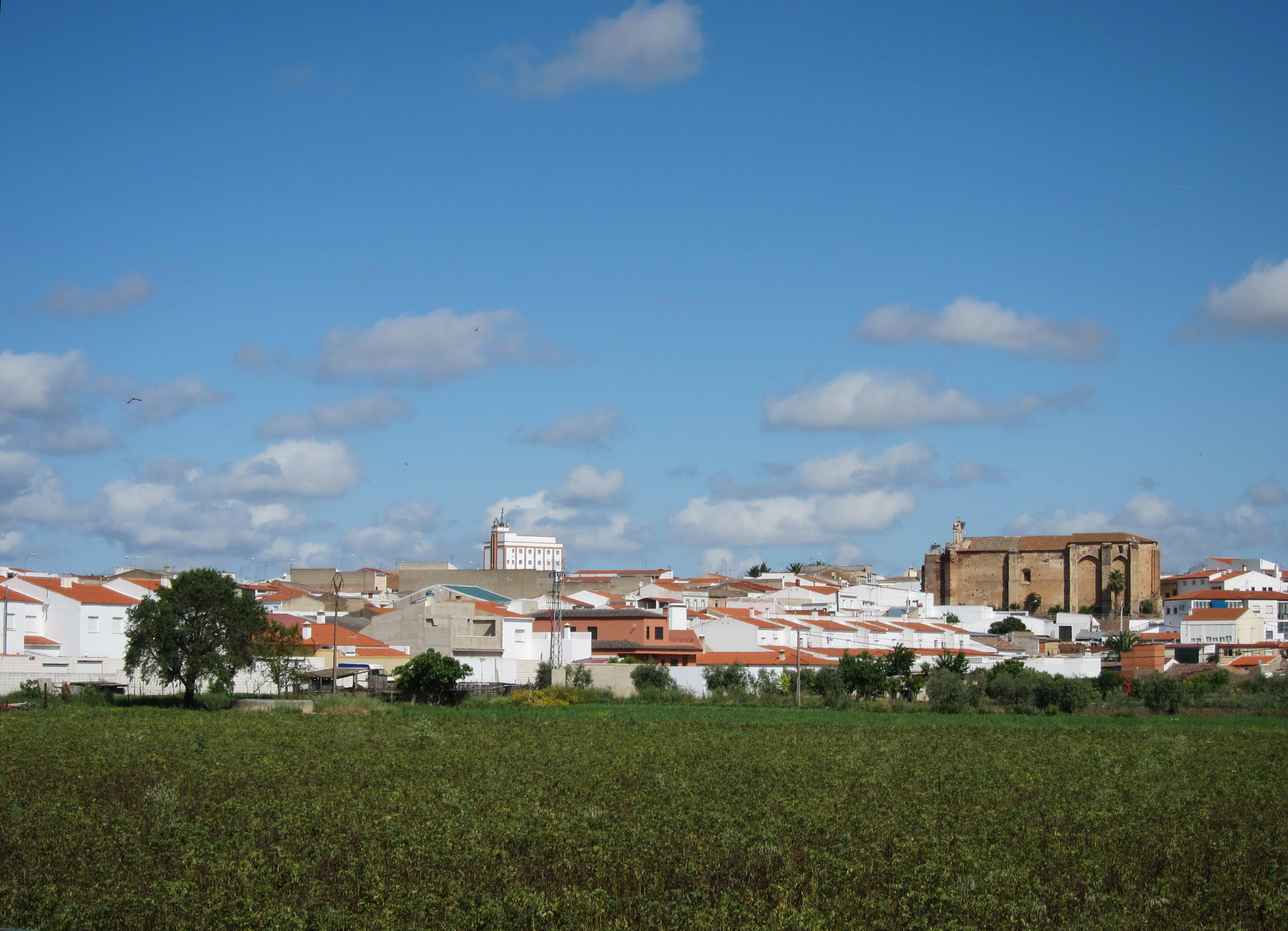 La Albuera in Spain